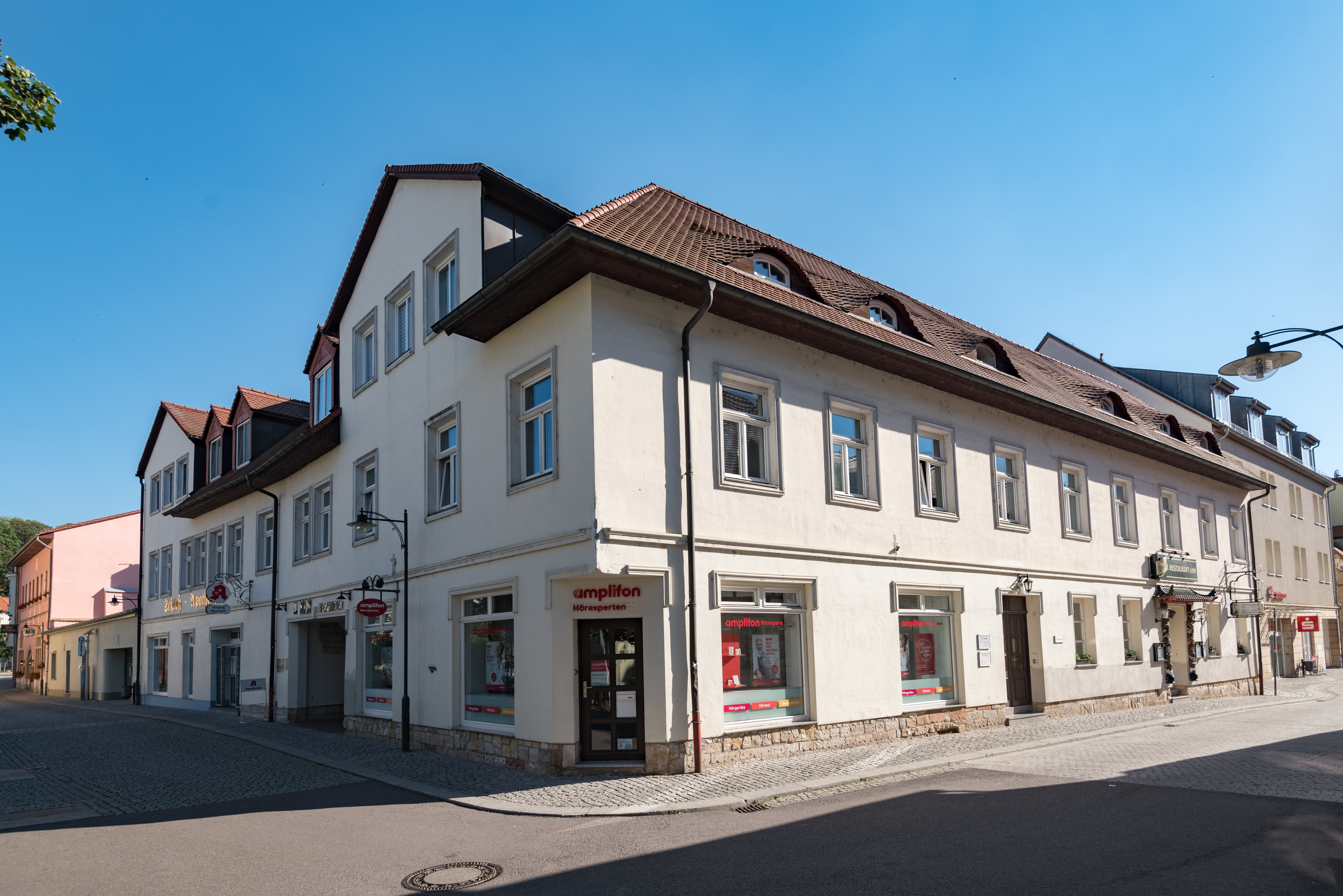 Weißenfels, Große Kalandstraße 2